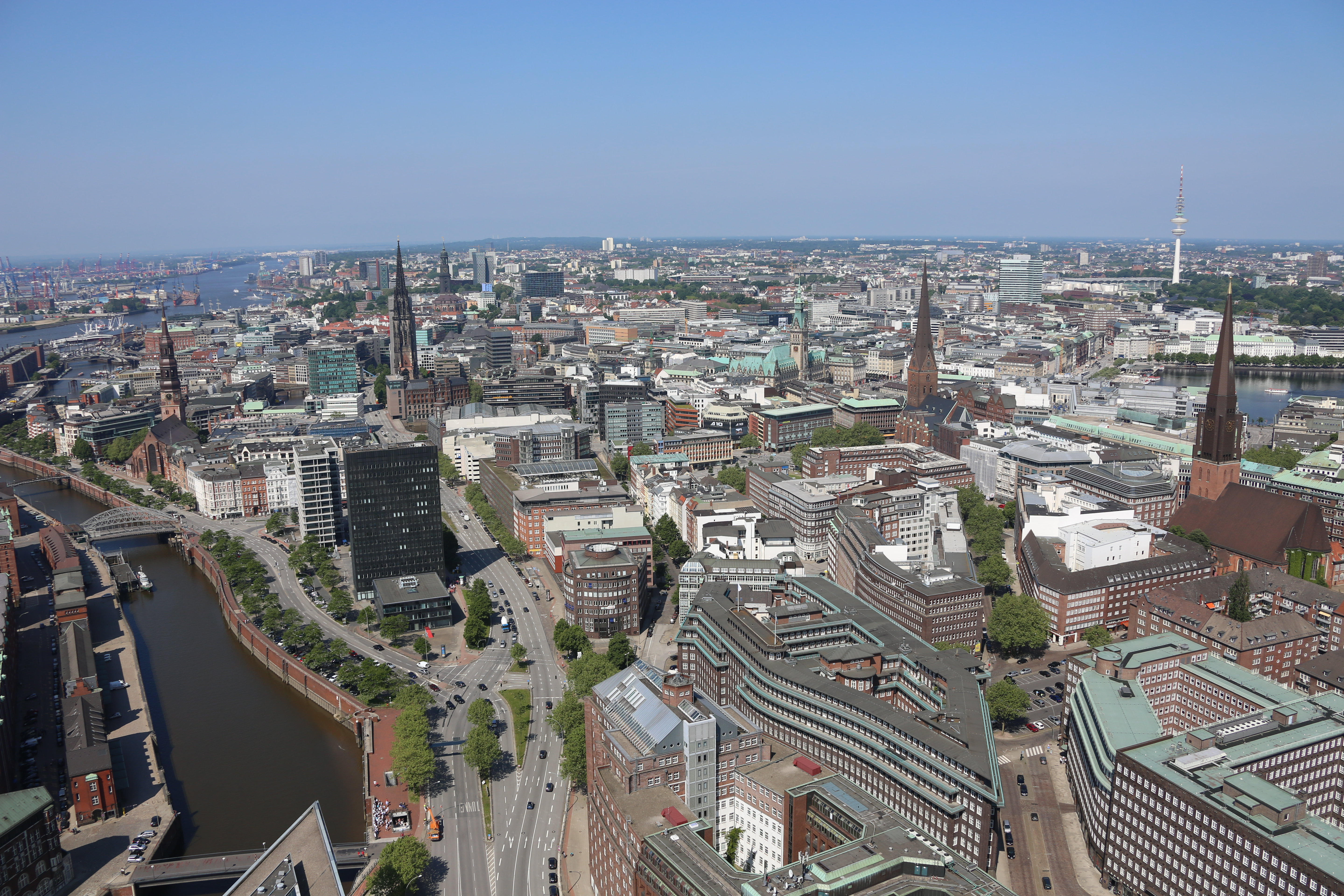 Projekt Heißluftballon, Fahrt über Hamburg und Umgebung. This photo was taken by Alchemist-hp. If you use one of my photos, an email (account needed) or a message or direct to: my email account would be greatly appreciated. Please note the license terms. Other licensing terms can get discussed, too. This file is copyrighted and has been released under a license which is incompatible with Facebook's licensing terms. It is not permitted to upload this file to Facebook.